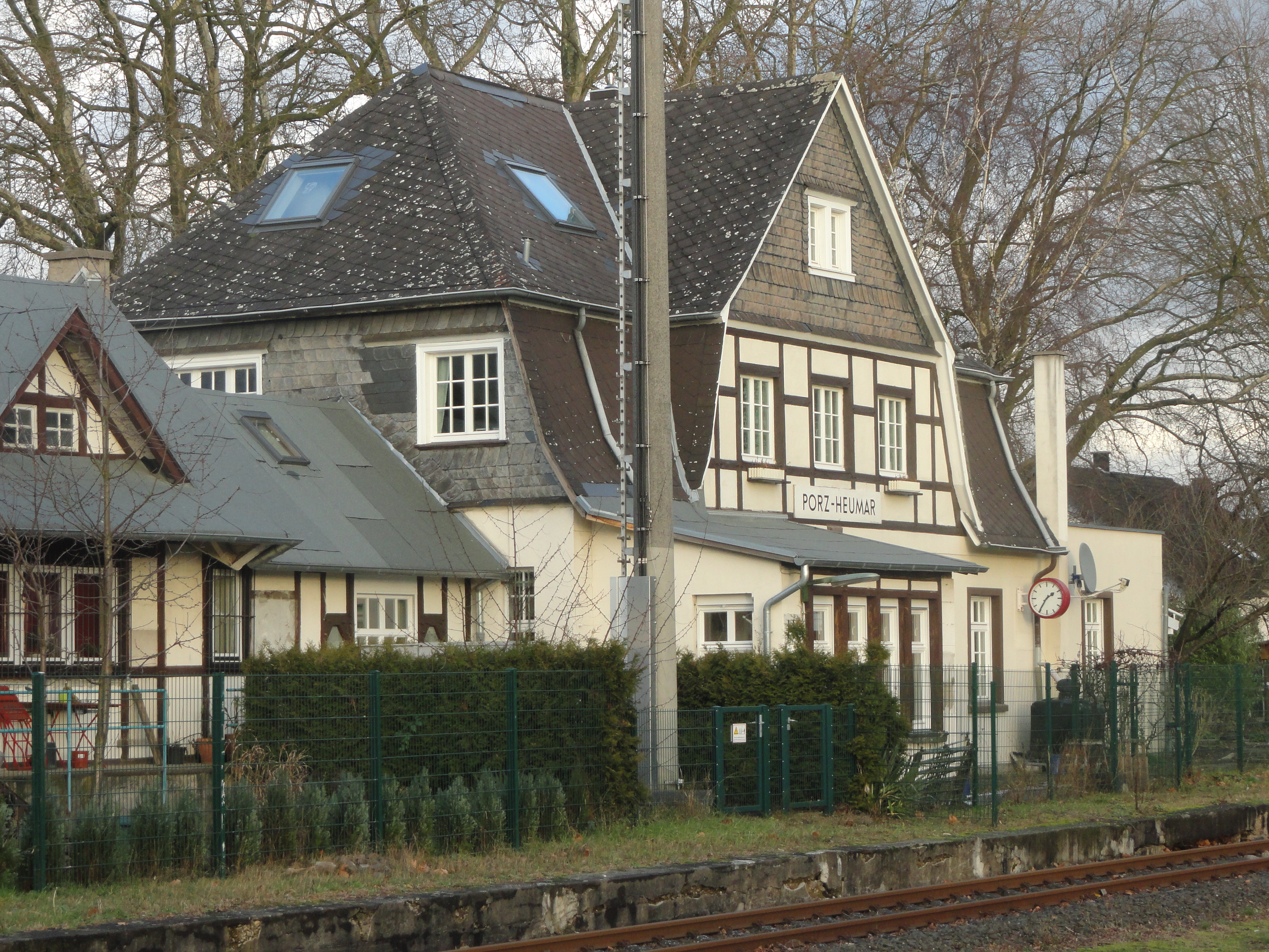 ehem. Bahnhof Rath-Heumar, Bahnseite This is a photograph of an architectural monument.